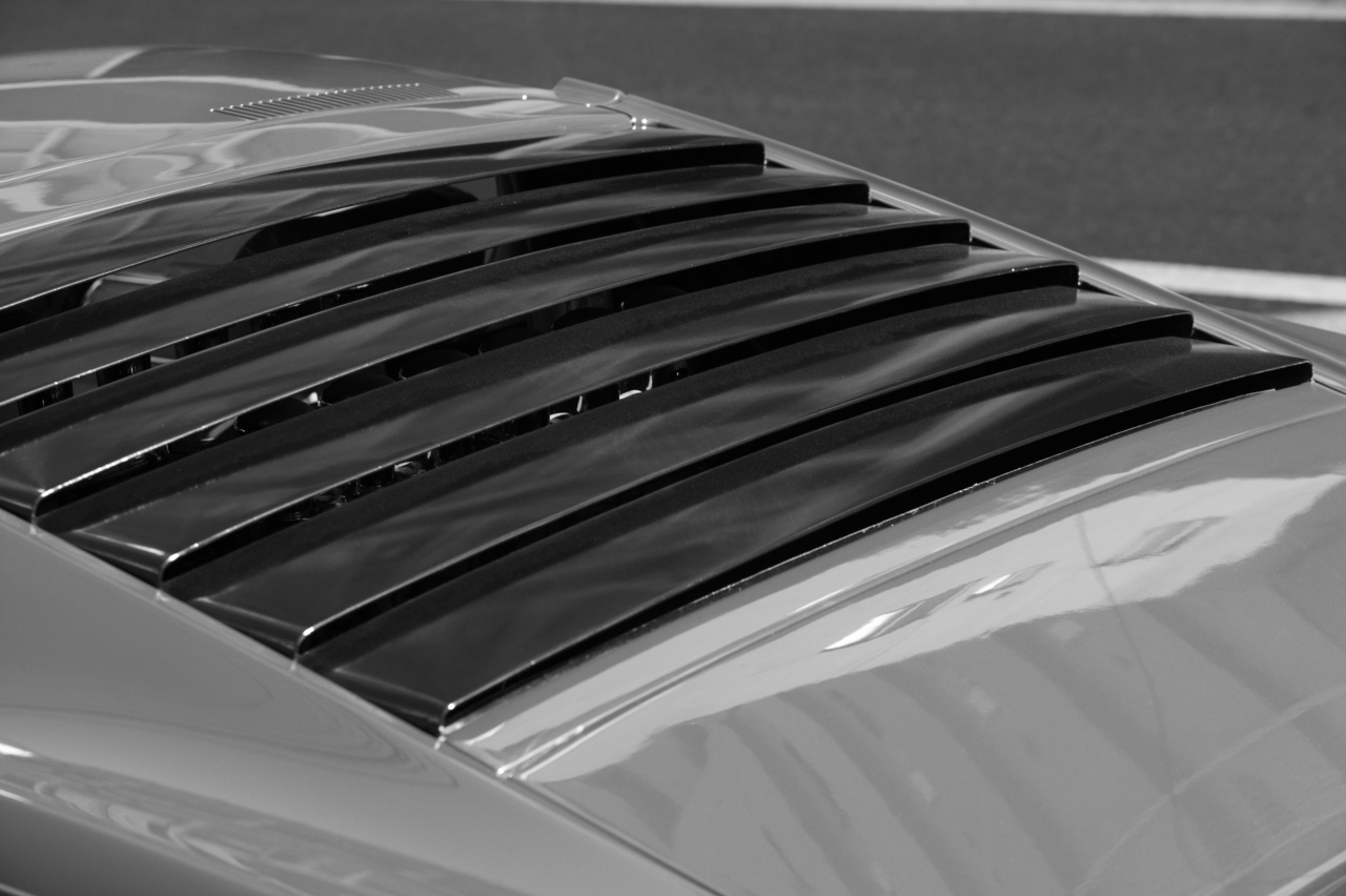 Lamborghini Miura S